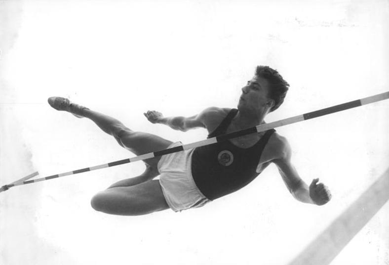 Werner Pfeil Zentralbild Wend-Ulm. 18.8.1958 Hochspringer Werner Pfeil Werner Pfeil (Karl-Marx-Stadt) wird im Hochsprung bei den Leichtathletik-Europameisterschaften 1958 in Stockholm an den Start gehen. UBz: Werner Pfeil beim Sprung.